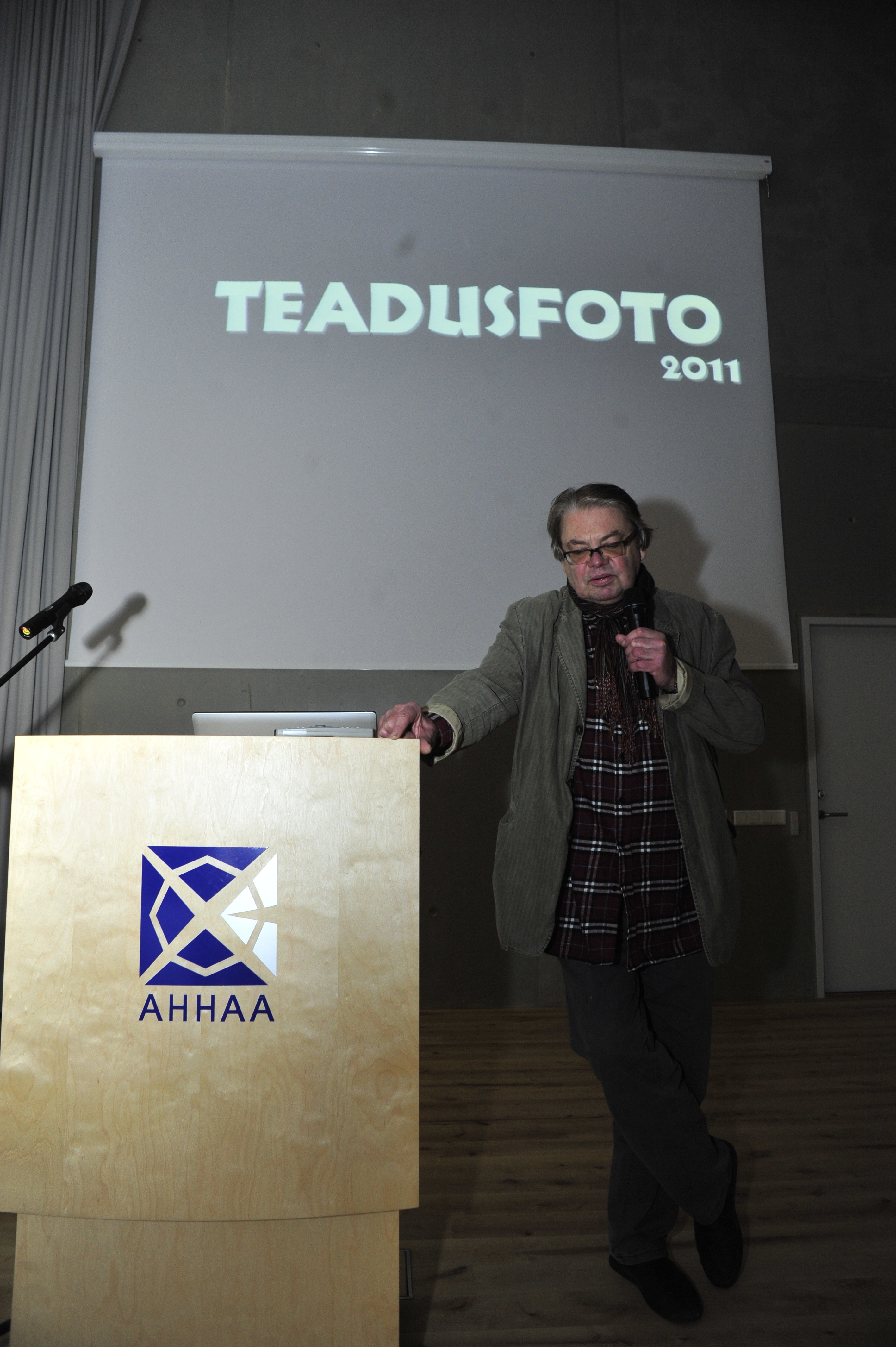 Tiit Kändler rääkimas Teadusfoto 2011 konkursil.